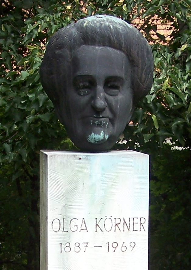 Büste Olga Körners im Park des nach ihr benannten Seniorenheims in Dresden-Strehlen